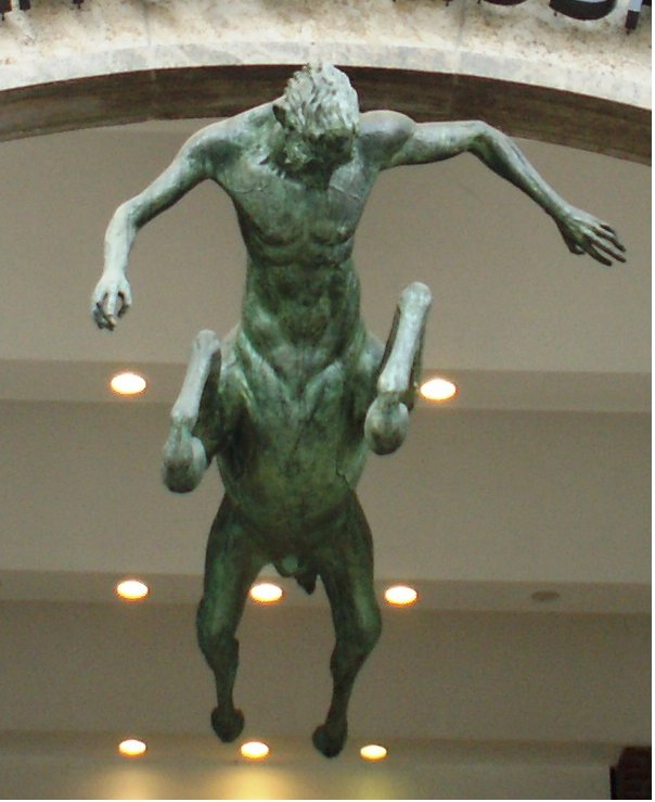 Eingangportal zur Einkaufspassage im Levantehaus in Hamburg, Deutschland mit Zentaurenfigur. Entree of the shopping mall Levantehaus in Hamburg, Germany, with centaur.